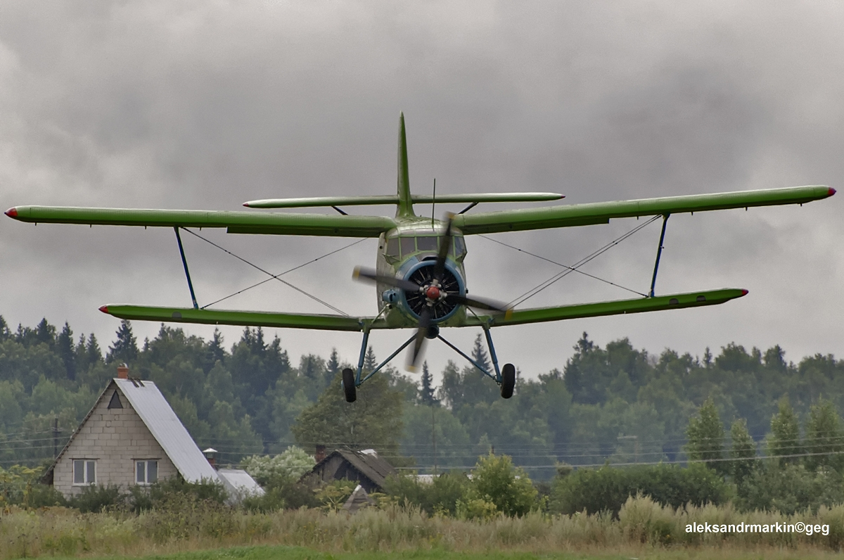 An-2. Landing.